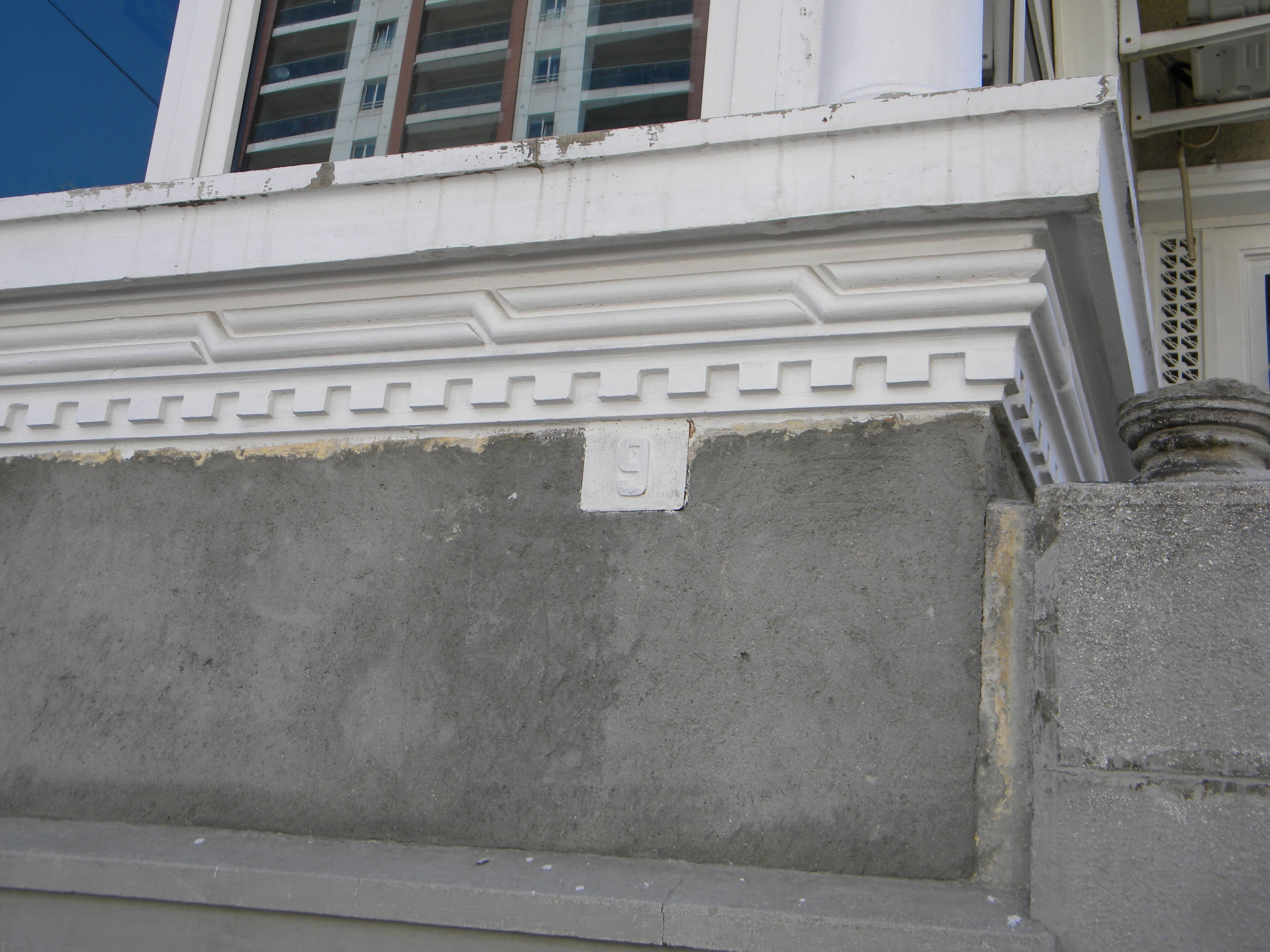 Bucuresti, Romania. Casa pe Str. Constantin Nottara nr. 9, sect. 3. B-II-m-B-19294 (detaliu)